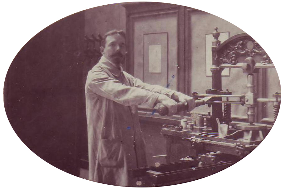 Foto van Edward Pellens in zijn atelier dd 1912